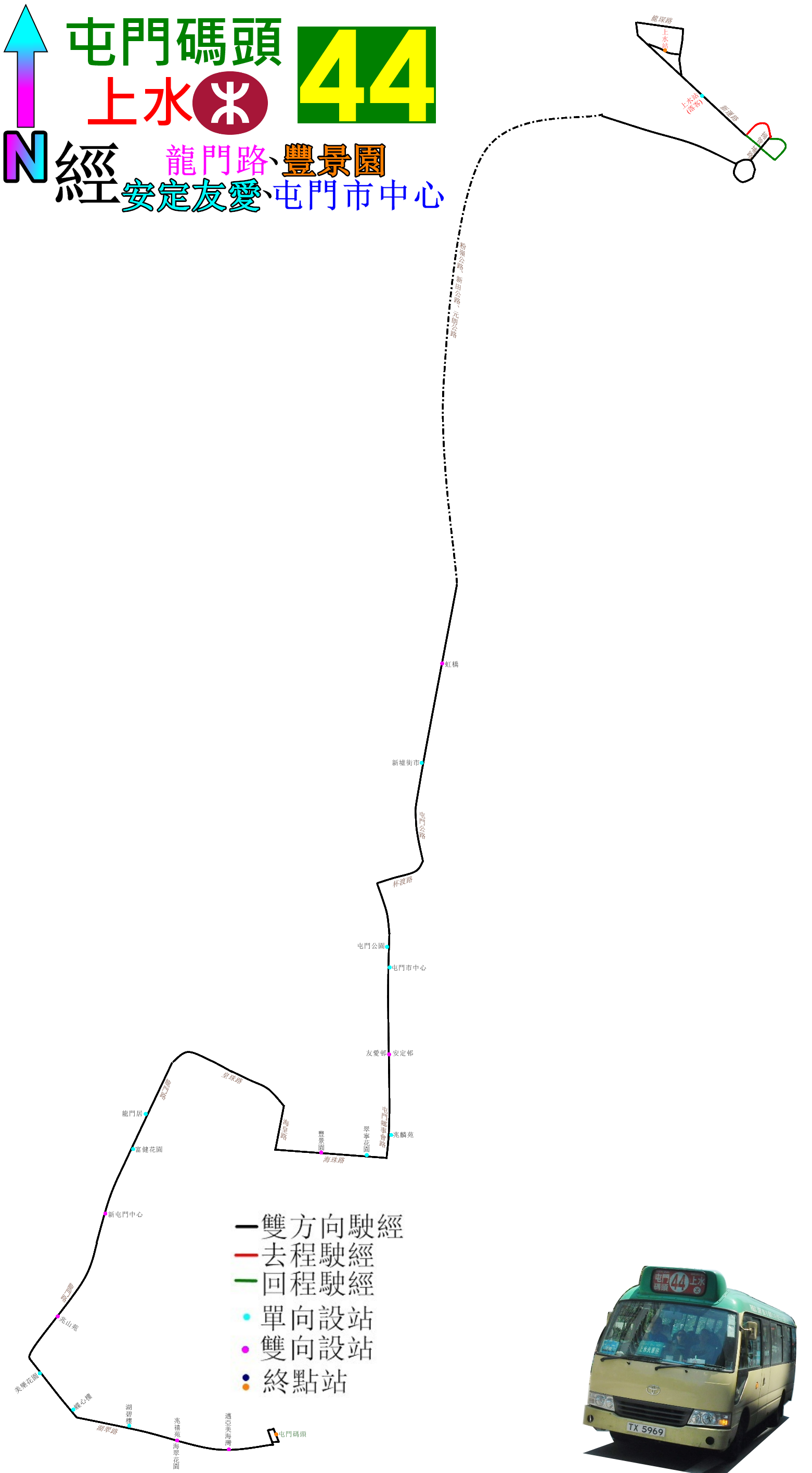 中文（香港）: 新界專線小巴44線的走線圖